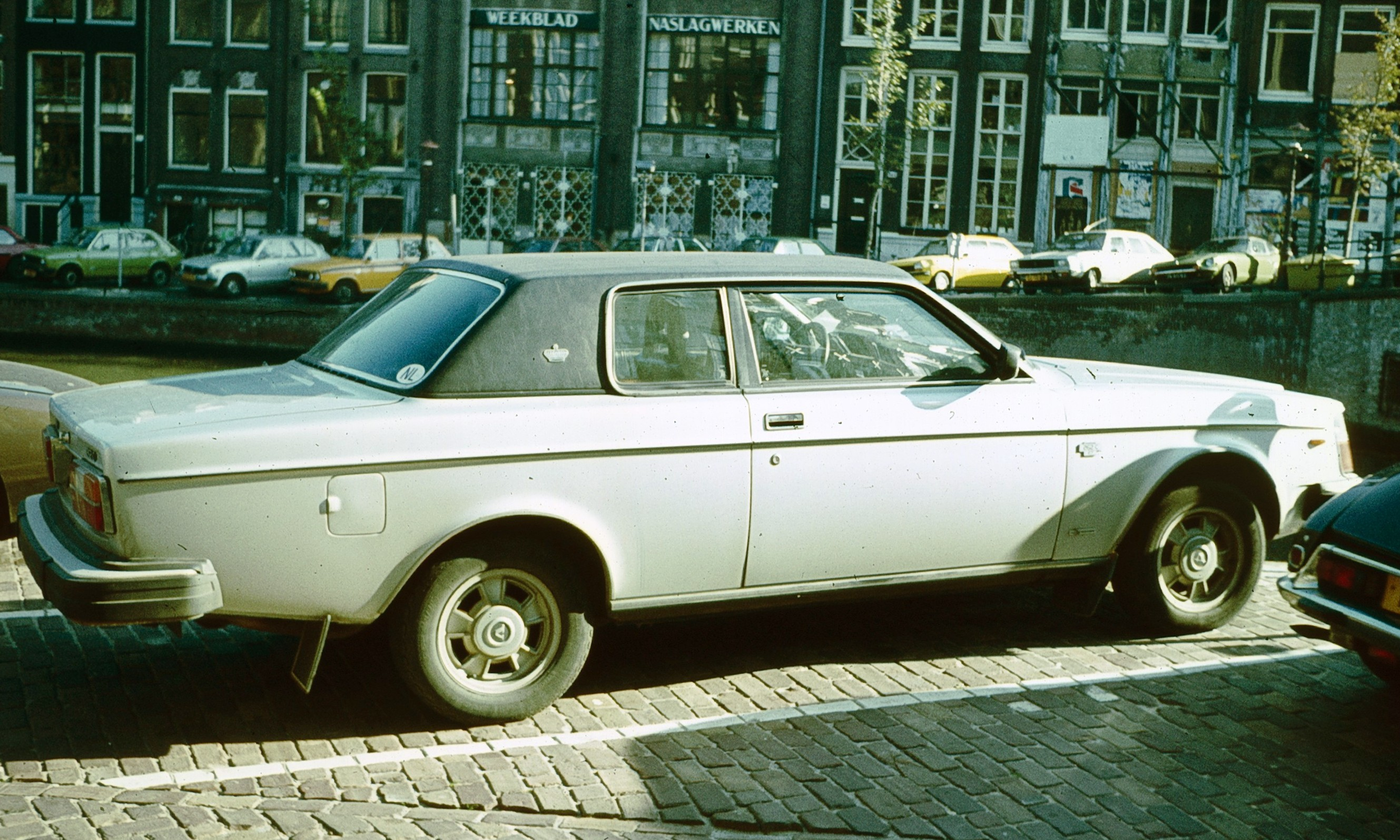 Volvo 262 in profile